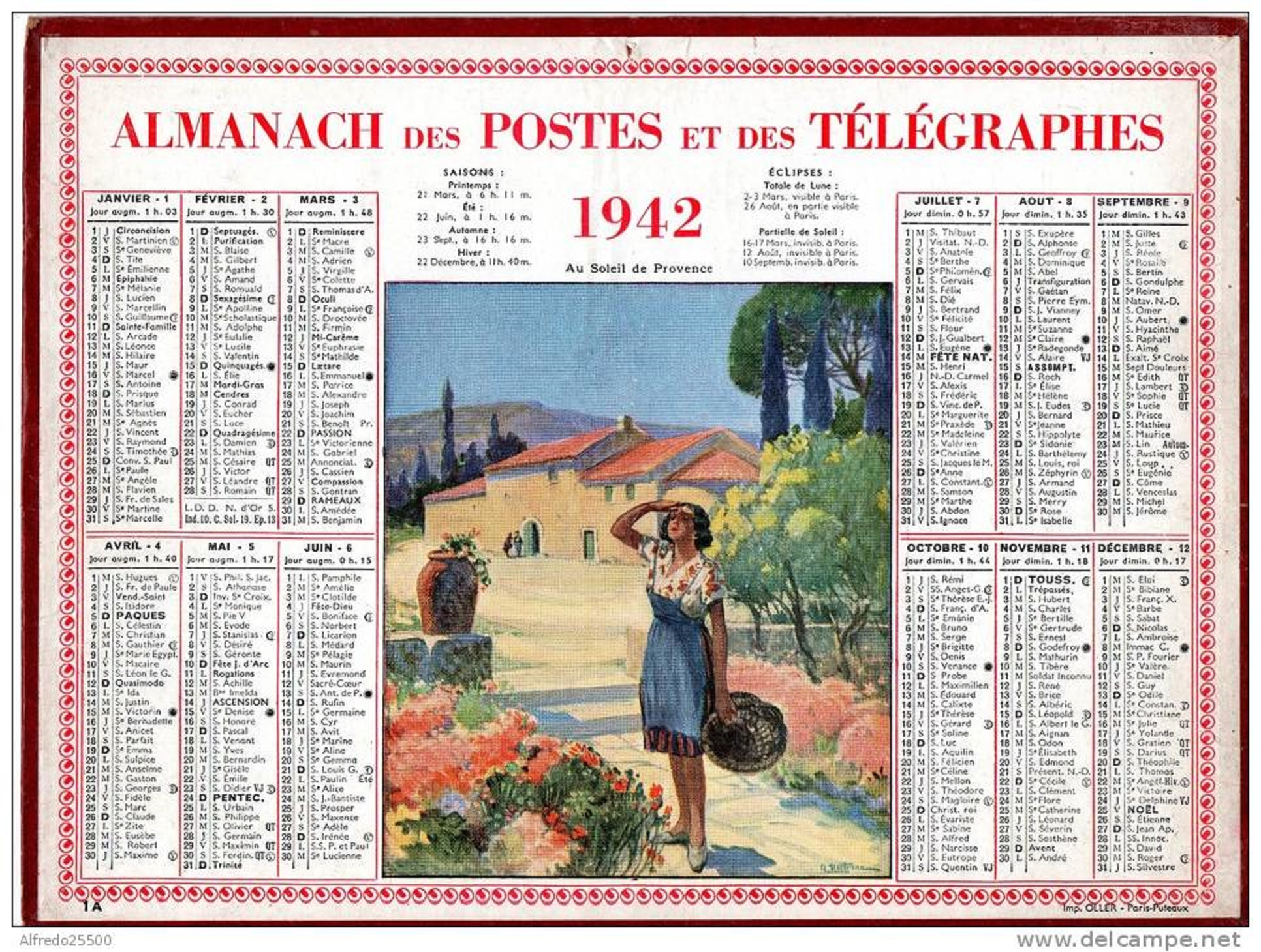 Calendrier des Postes 1942 Au soleil de Provence